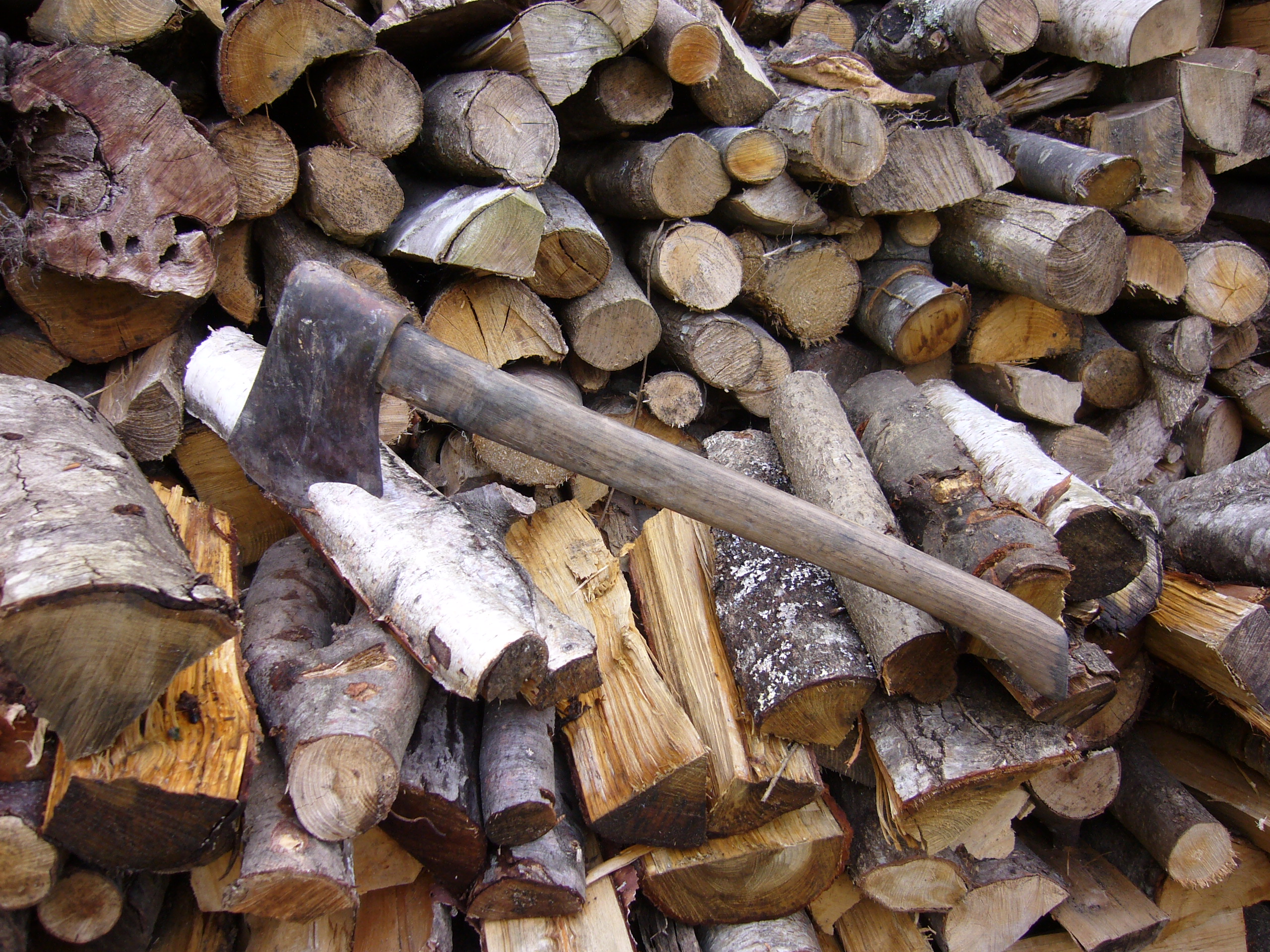 Lanerako euskal aizkora tipikoa.